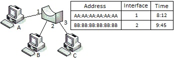 Conexión de tres equipos mediante un bridge y su respectiva tabla de reenvíos.